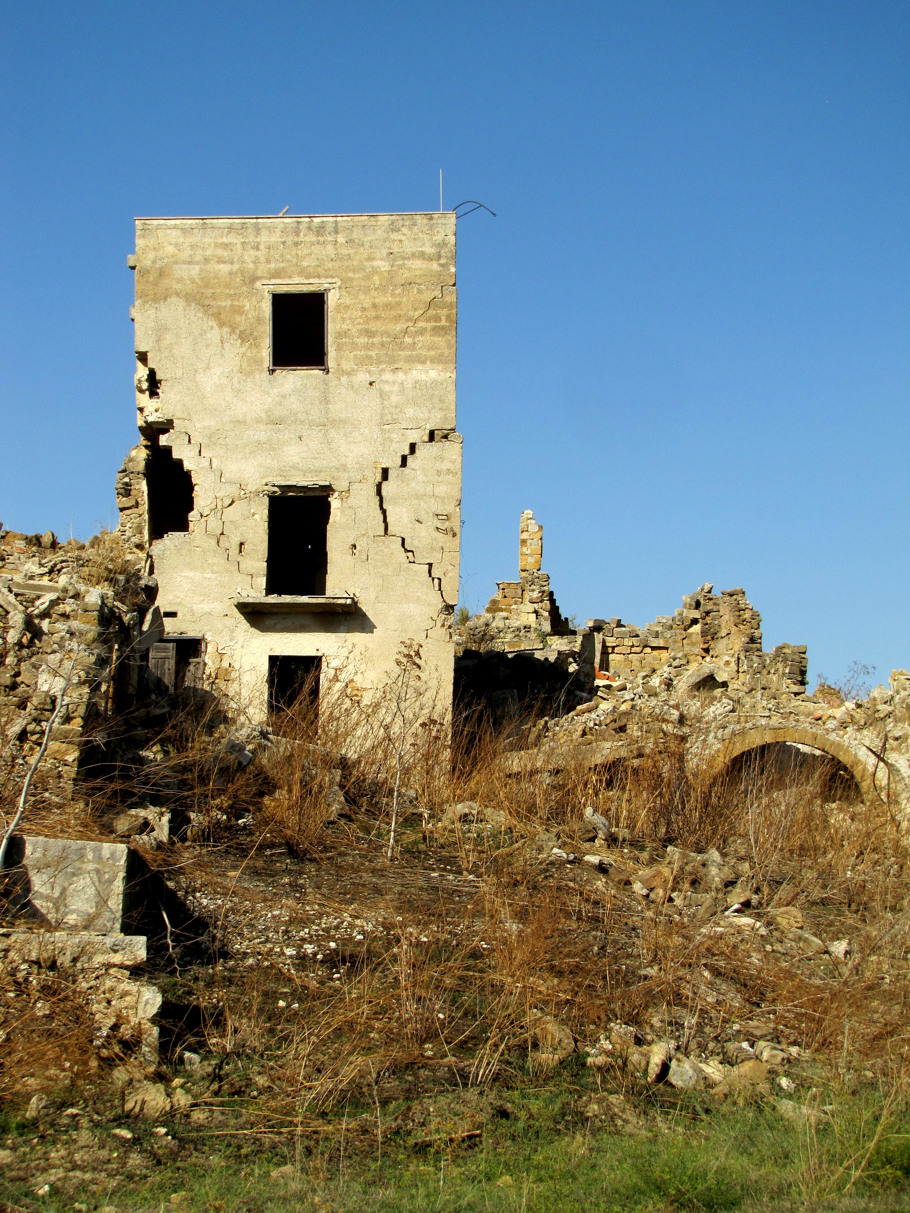 Ruderi del vecchio borgo di Salaparuta